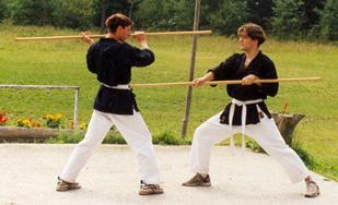 Slika borbe v kobudu. Slika je nastala leta 1999 v Kranjski gori na letnih pripravah.